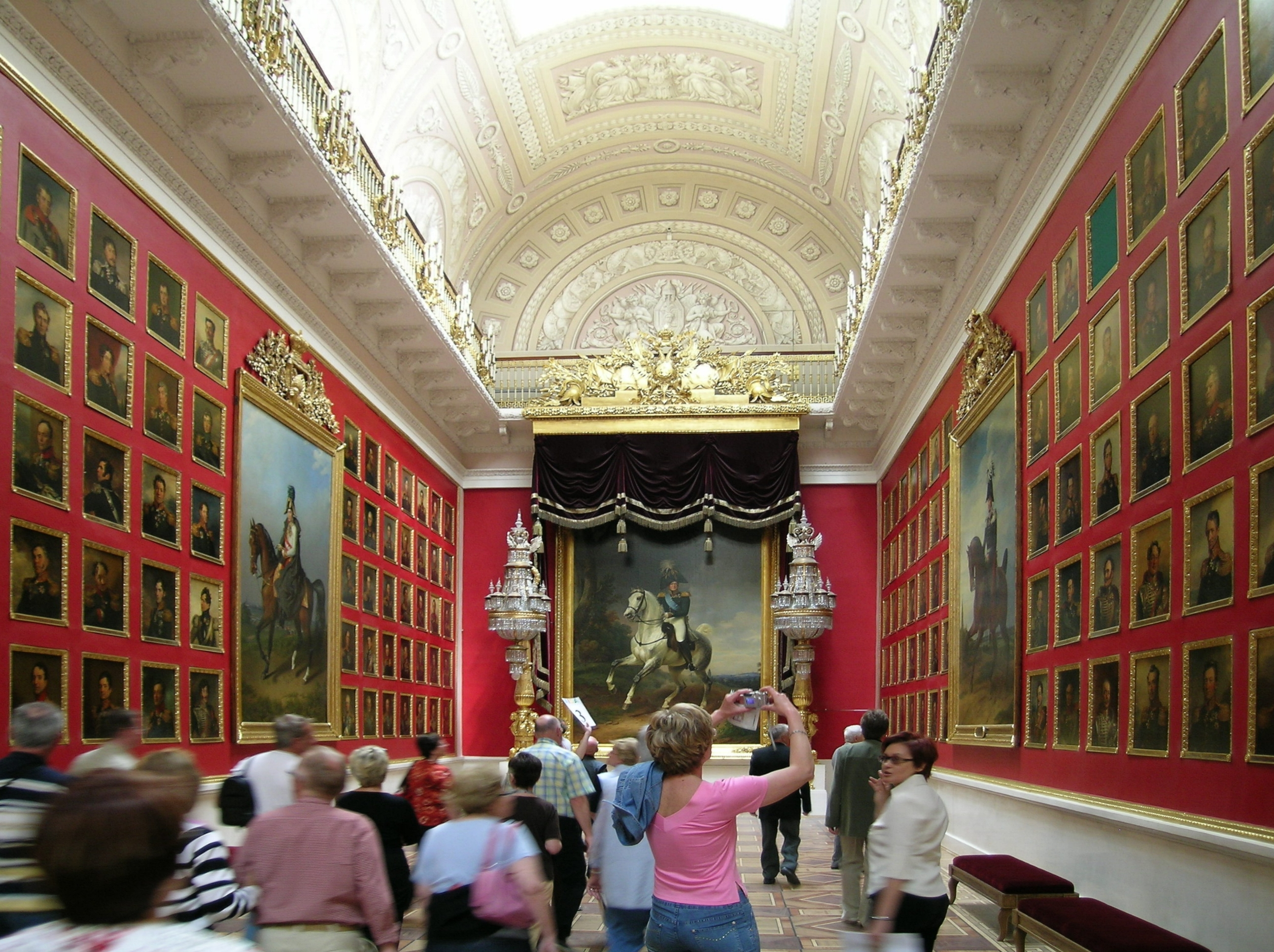 Militärgalerie in dem Winterpalast (der Eremitage) St. Petersburg (Ruhmeshalle der russischen Helden des Vaterländischen Krieges von 1812)